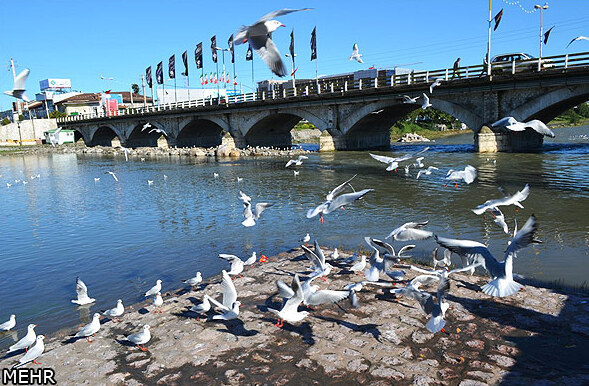 پل چشمه کیله تنکابن ساخته شده توسط مهندسین آلمانی در دوره ی پهلوی اول